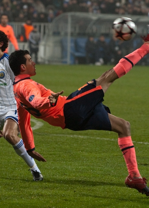 Sergio Busquets ejecuta una chilena, en un partido frente al Dynamo de Kiev.